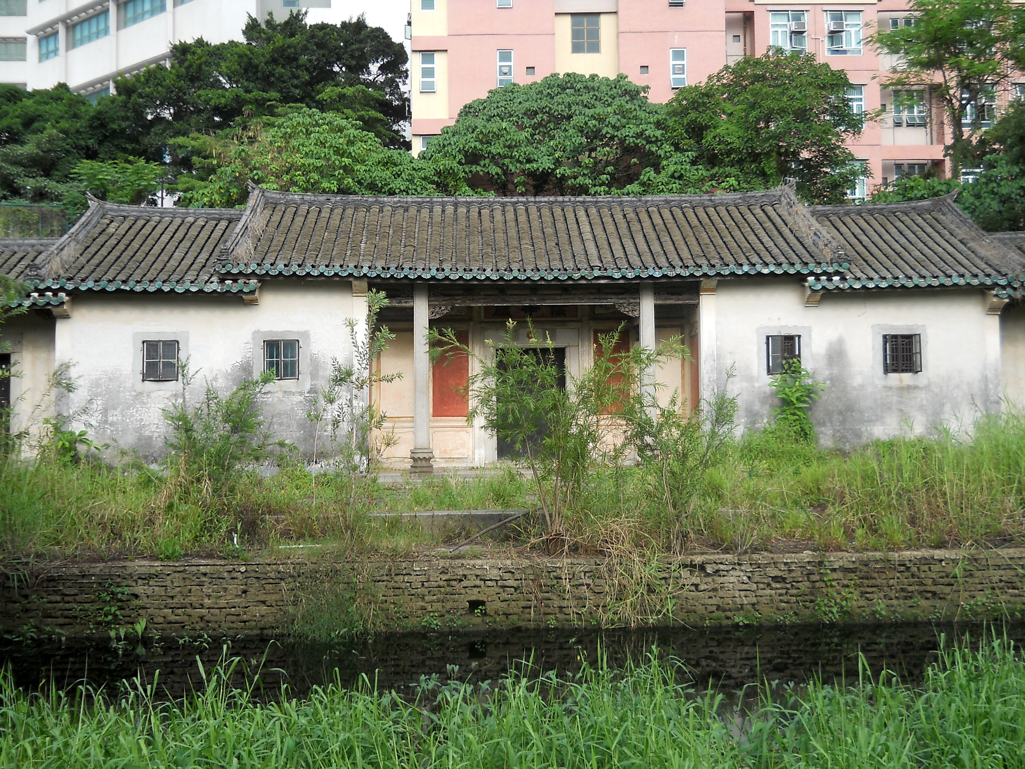 中文（香港）: 潘屋